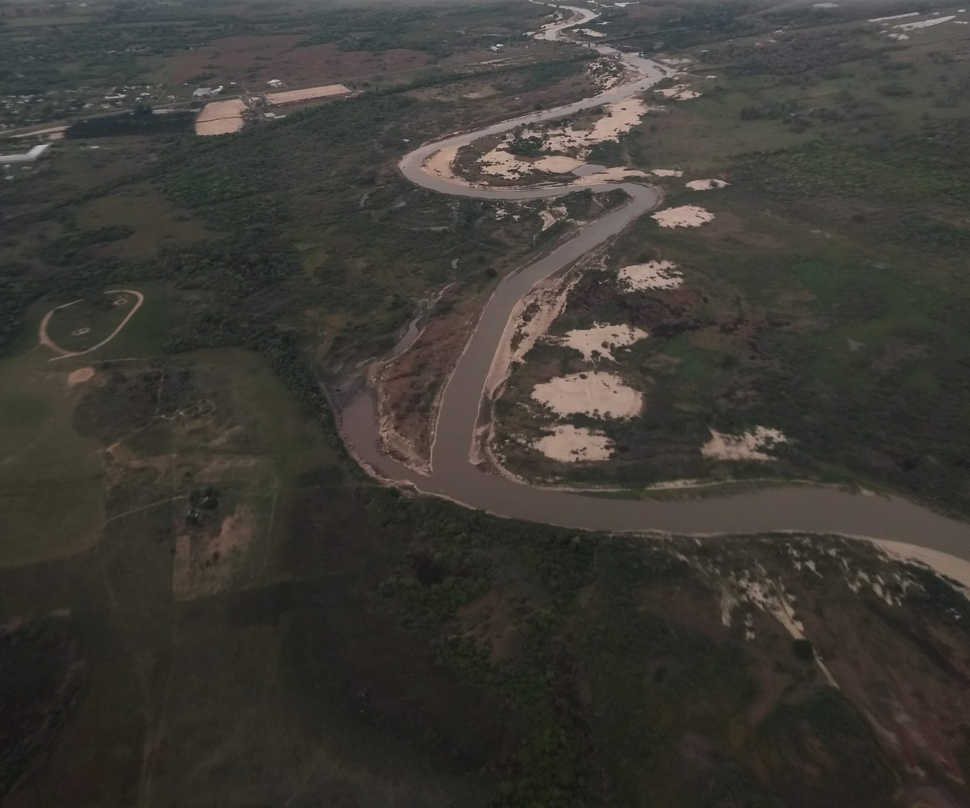 Tramo final del arroyo Riachuelo desde avión comercial llegando a Corrientes